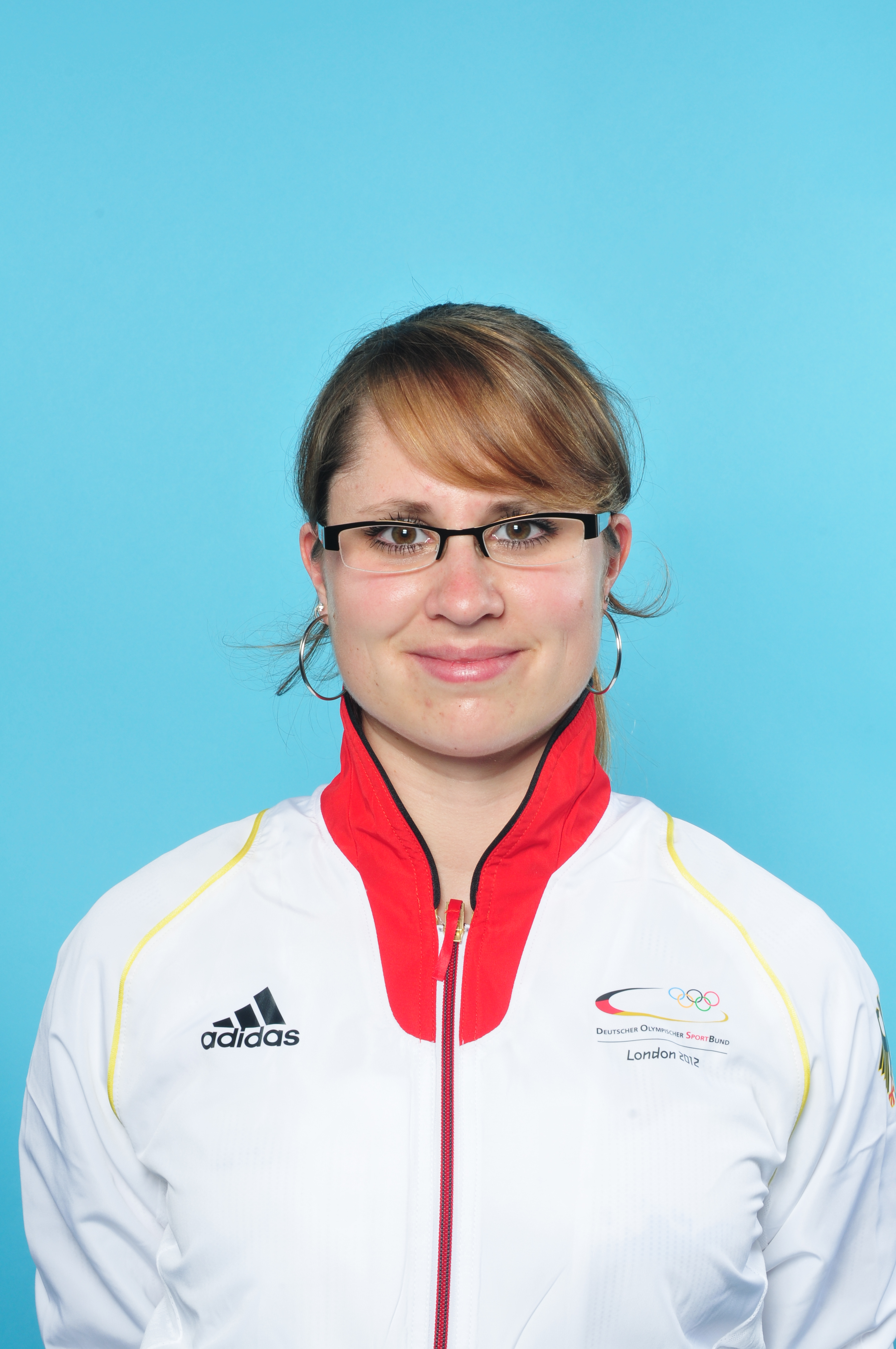 Einkleidung der deutschen Olympiamannschaftam 28. Juni 2012 in Mainz - Olympische Sommerspiele 2012 Cirdan Marcus Cyron Olaf Kosinsky Ralf Roletschek Sven Teschke